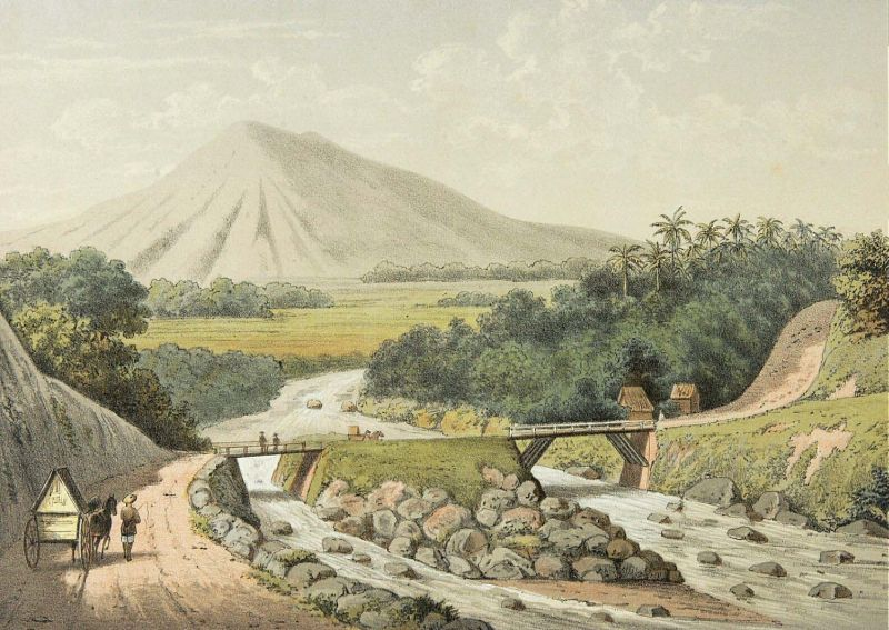 Litho. Kleurenlitho naar een oorspronkelijke aquarel van Rappard.. Twee bruggen over de rivier in Gedoeng Badak